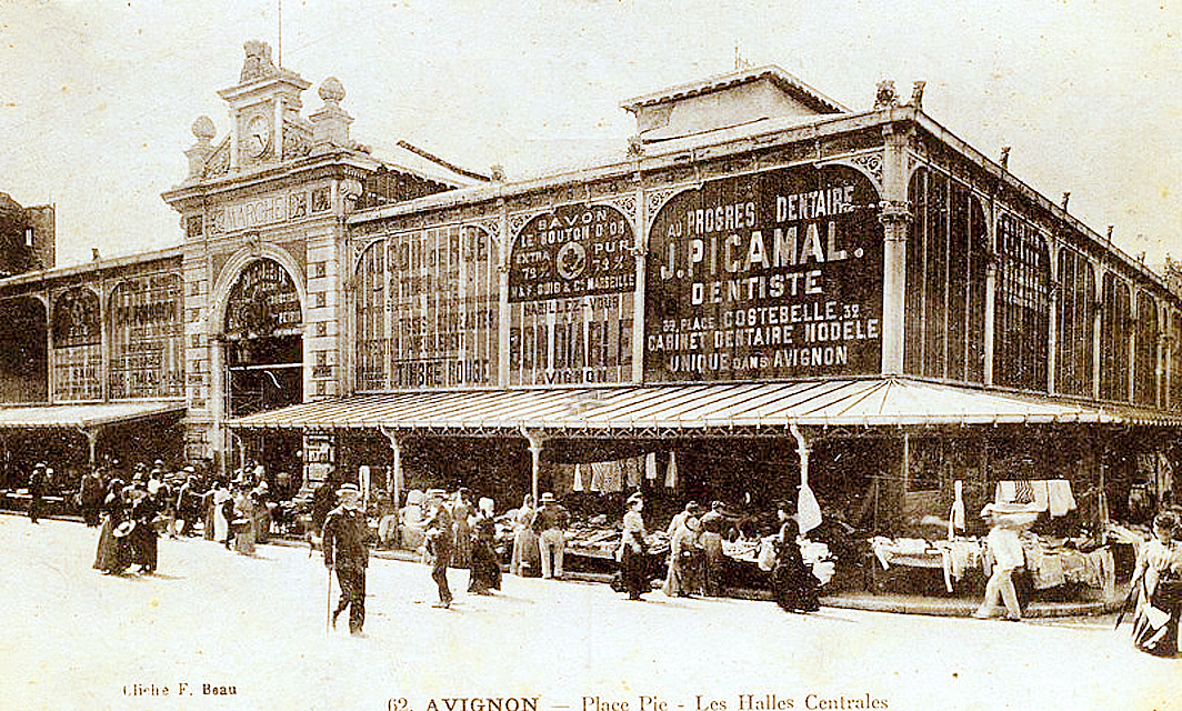 Les Halles d'Avignon au début du XXe siècle